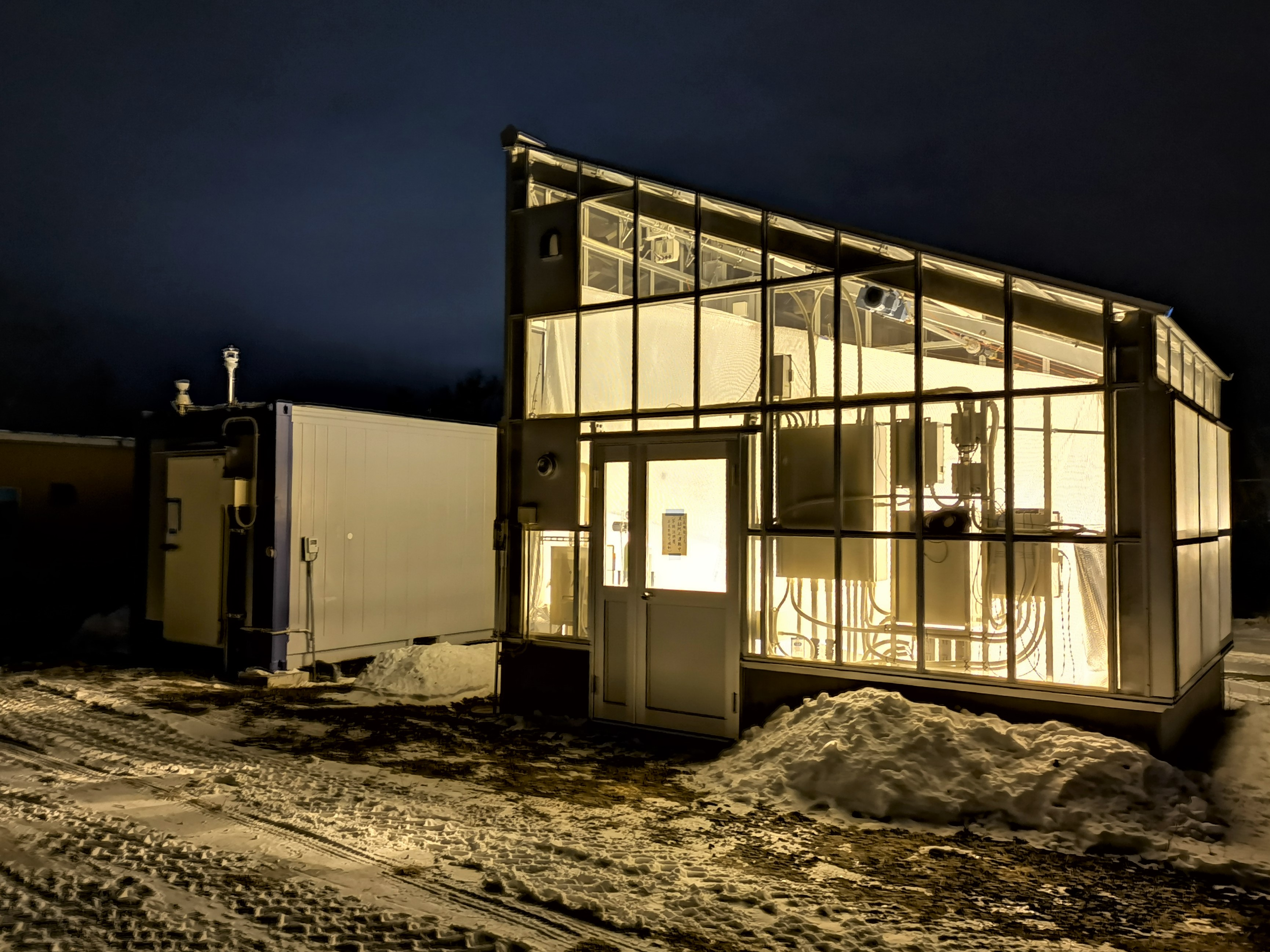 釧路工業高等専門学校にある実習用植物工場。右が採光型、左が完全管理型。